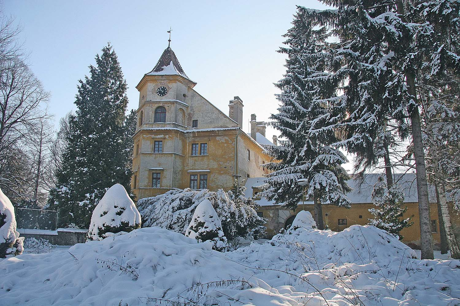 Radim - zámek. District Kolín autor:Prazak date: 26. 1. 2007